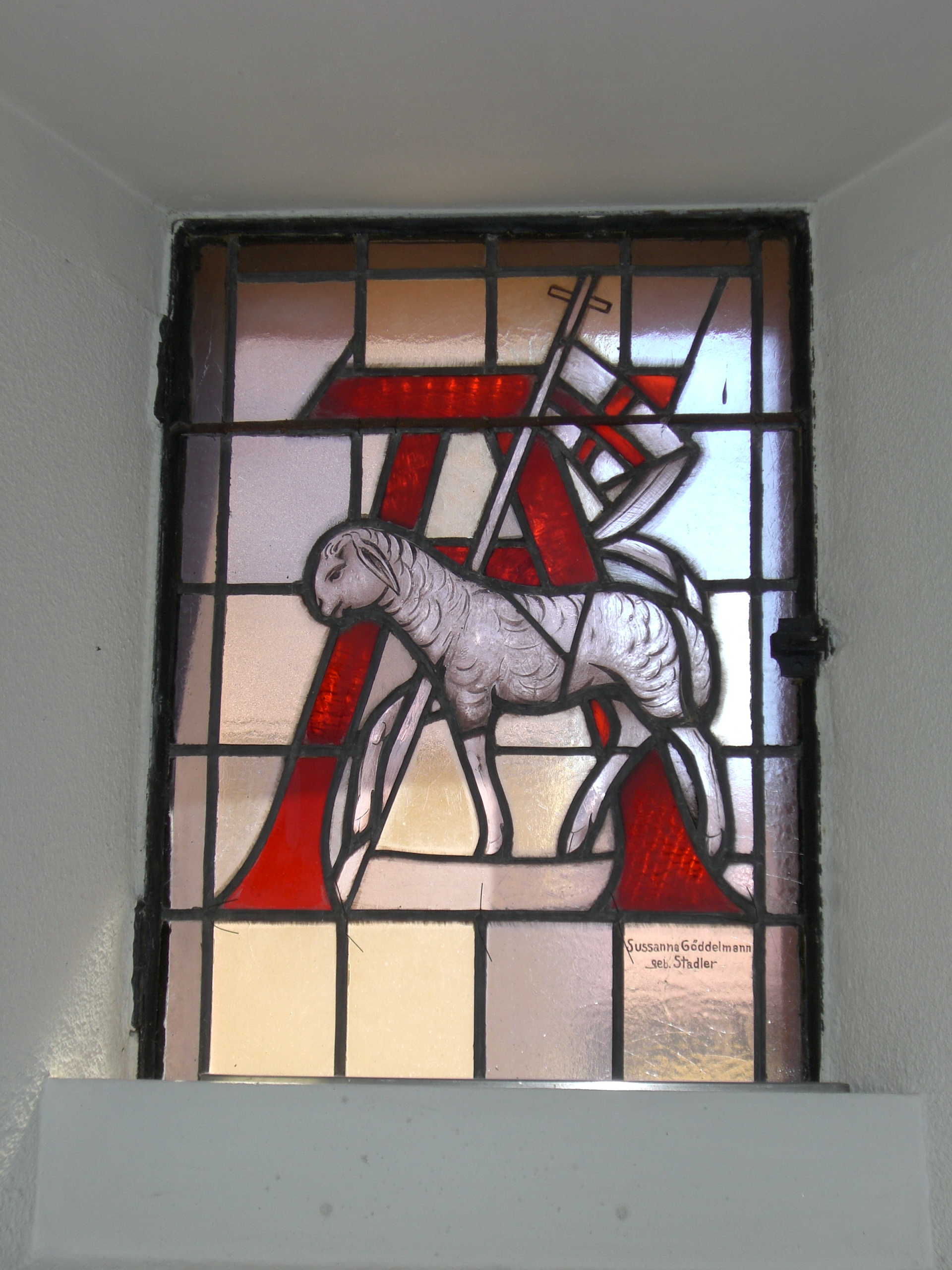 Alpha und Omega - Fenster in der Protestantischen Kirche in Römerberg- Mechtersheim